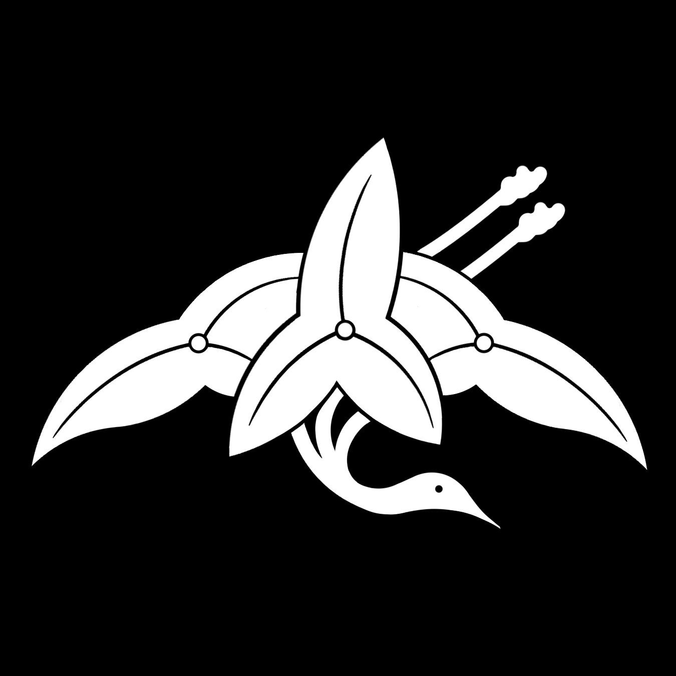 「澤瀉鶴」紋（染抜）